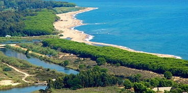 Foto area di un tratto di costa del Comune di Lotzorai